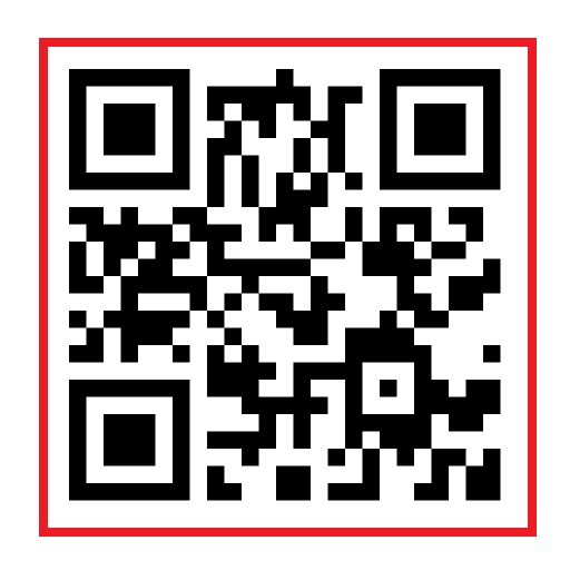 Tepak Sirih